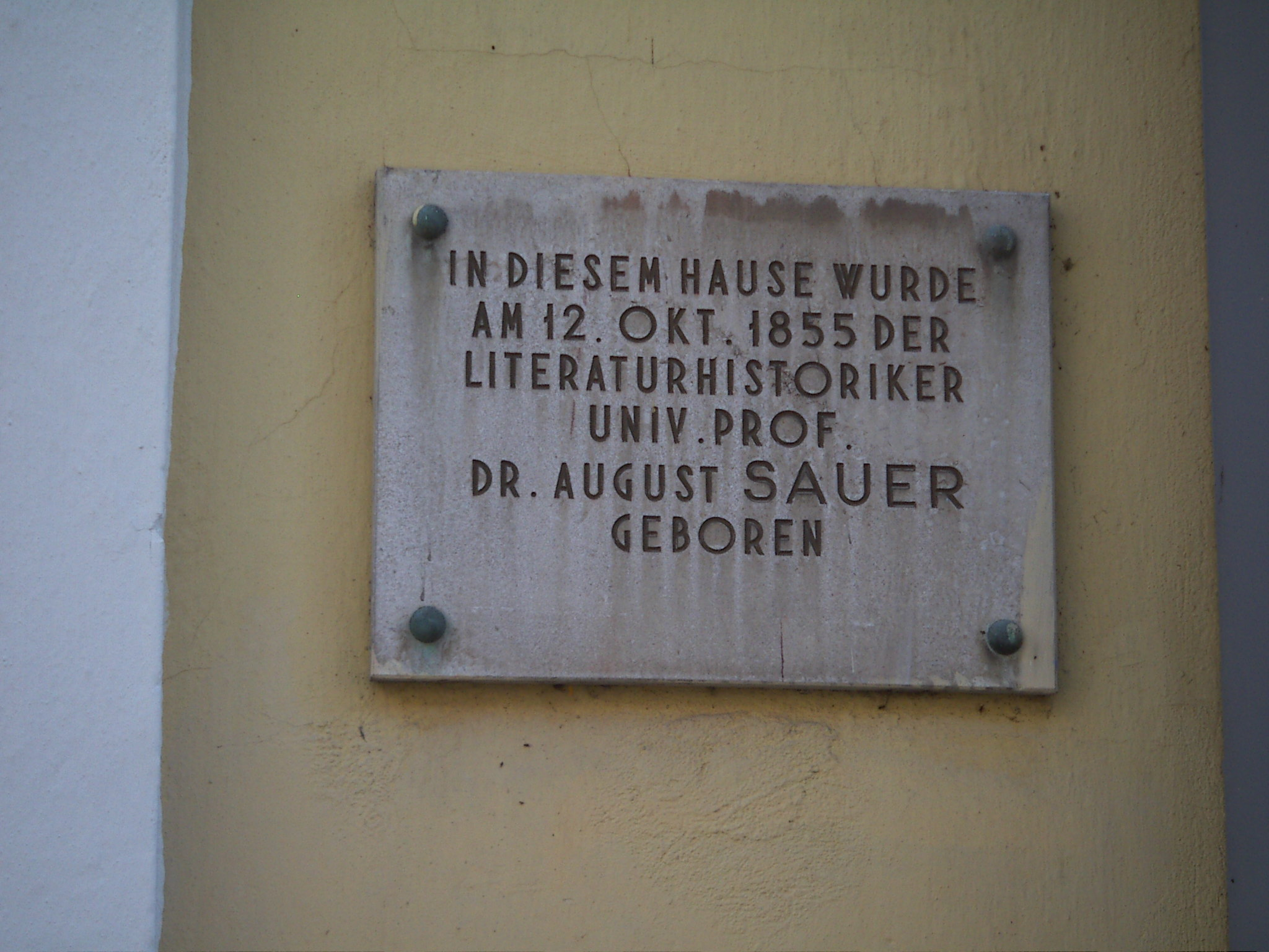 August Sauer, Gedenktafel am Geburtshaus in der Herzog-Leopold-Straße 7 in Wiener Neustadt